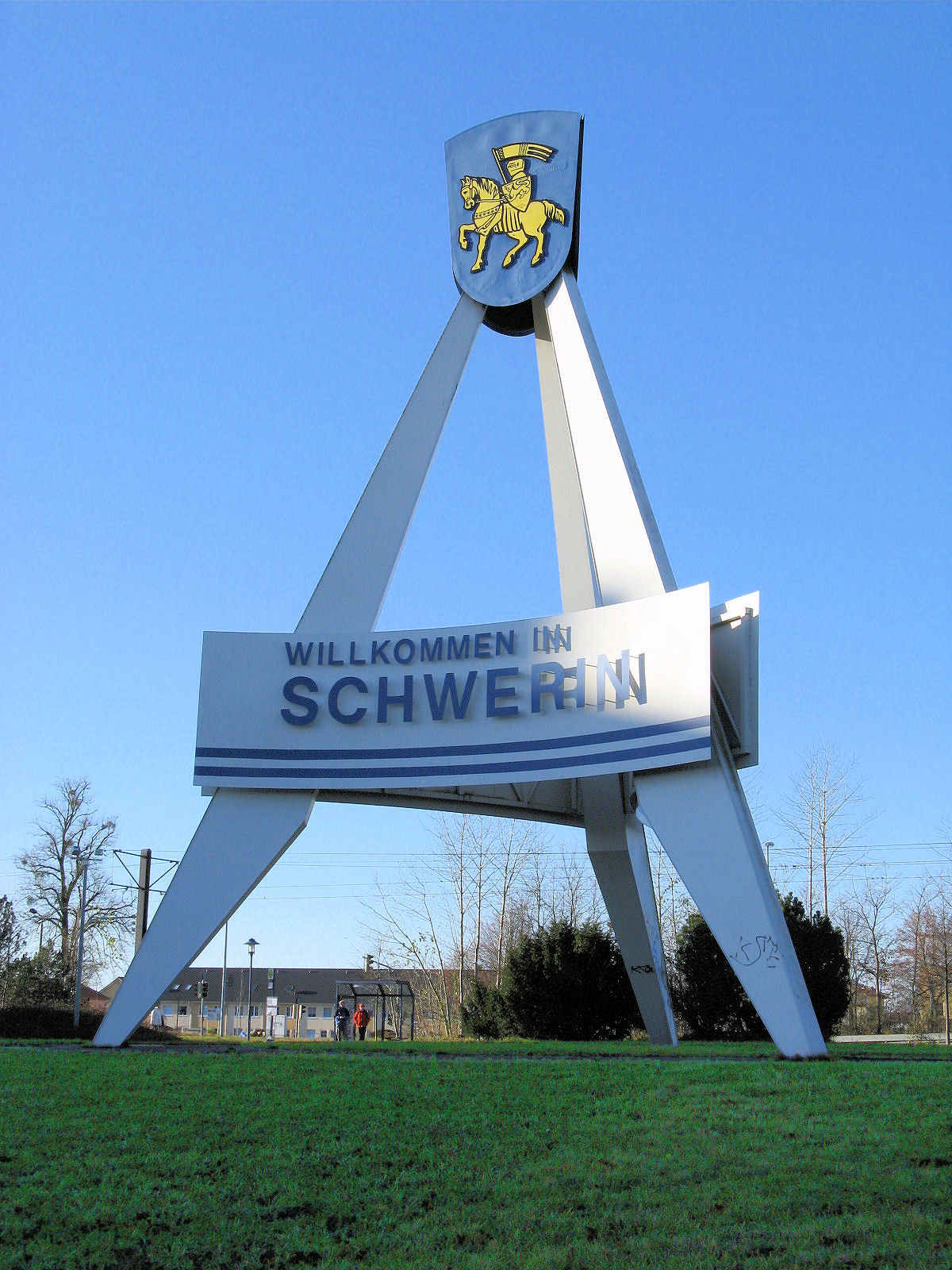 Skulptur "Willkommen in Schwerin" auf dem Großen Dreesch in Schwerin